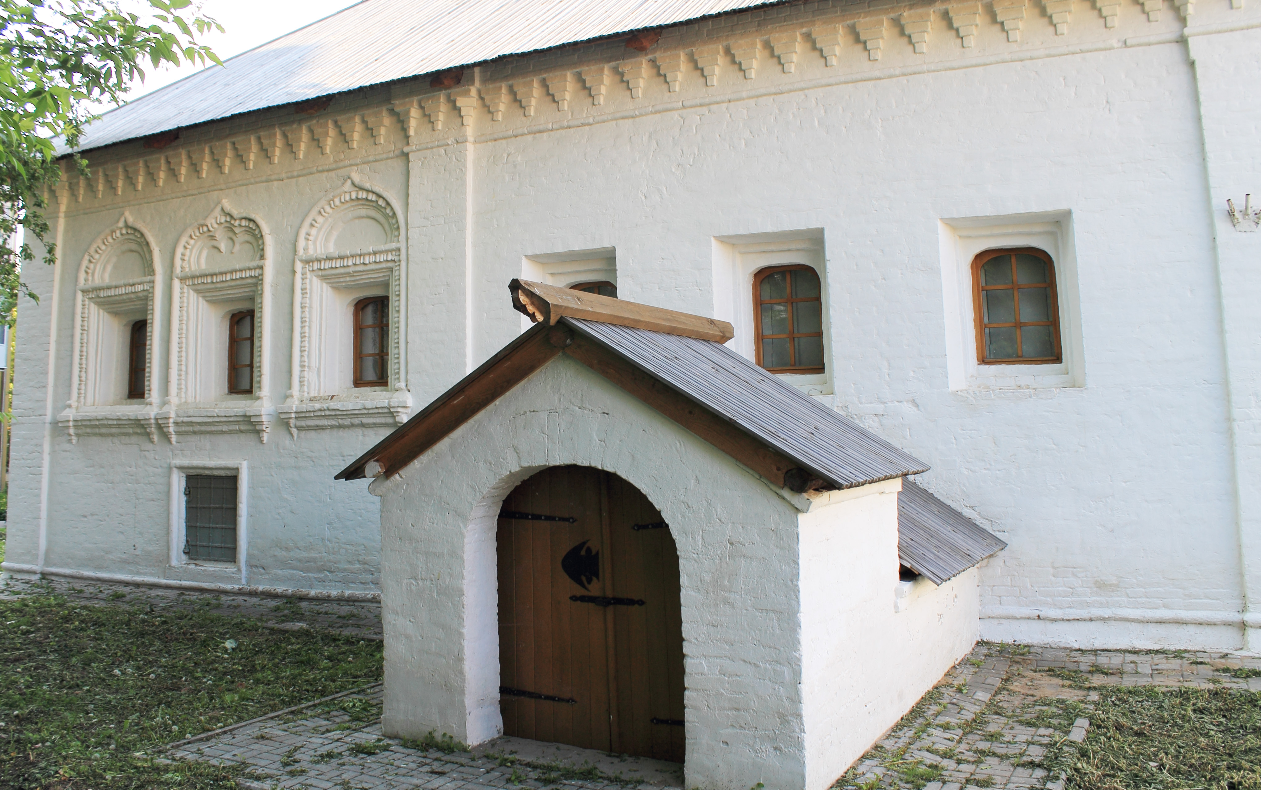 Корпус одноэтажный: улица Гоголя, 52 (лит. Б), Нижний Новгород, Нижегородская область